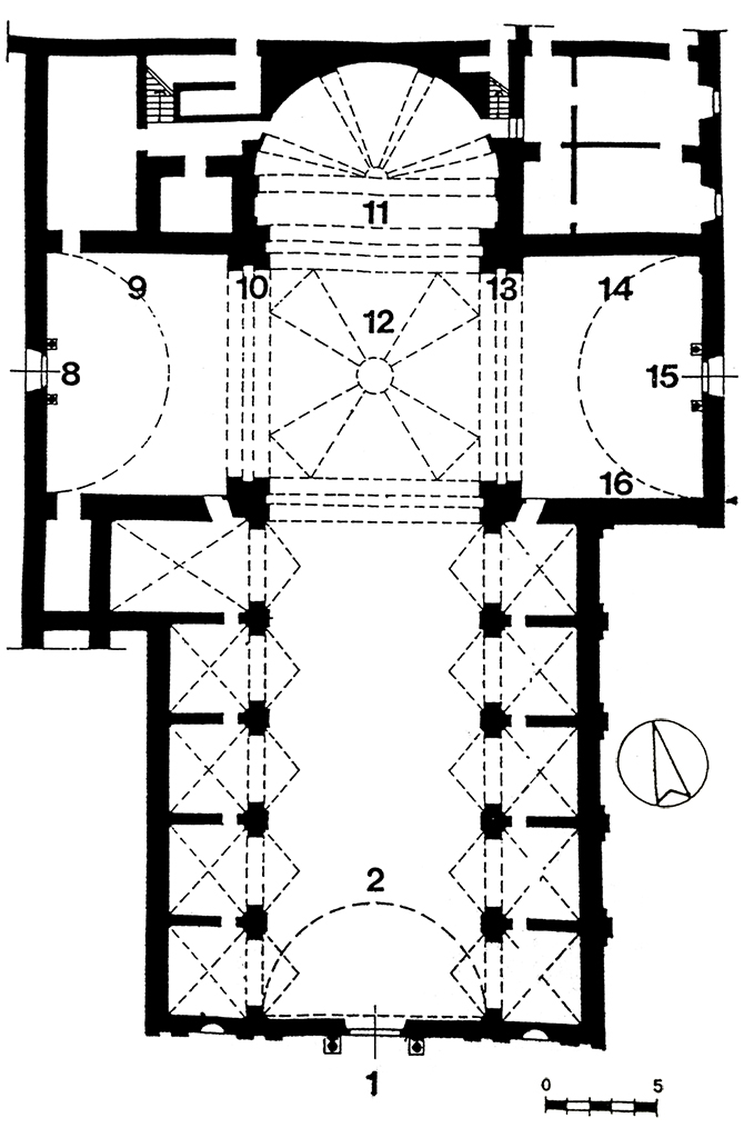 Pianta della chiesa di Santa Croce di Bosco Marengo (AL)